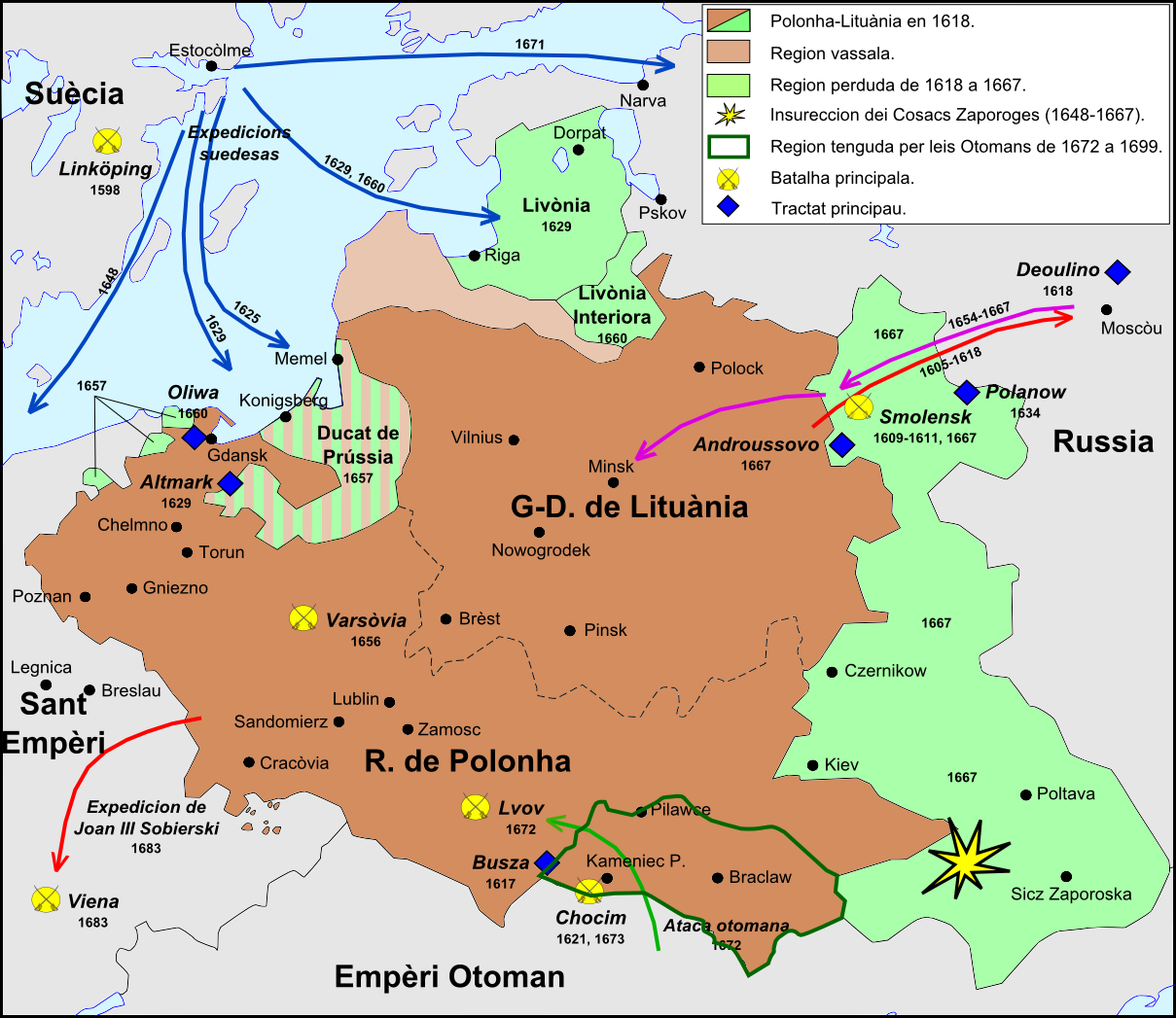 Evolucion territòriala de Polonha dins lo corrent dau sègle XVII.